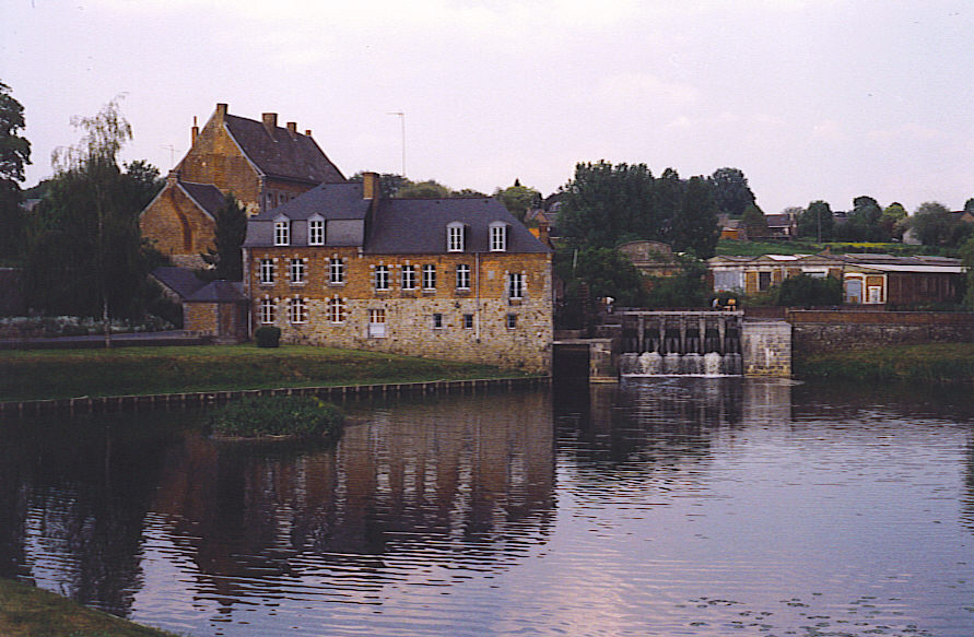 self made